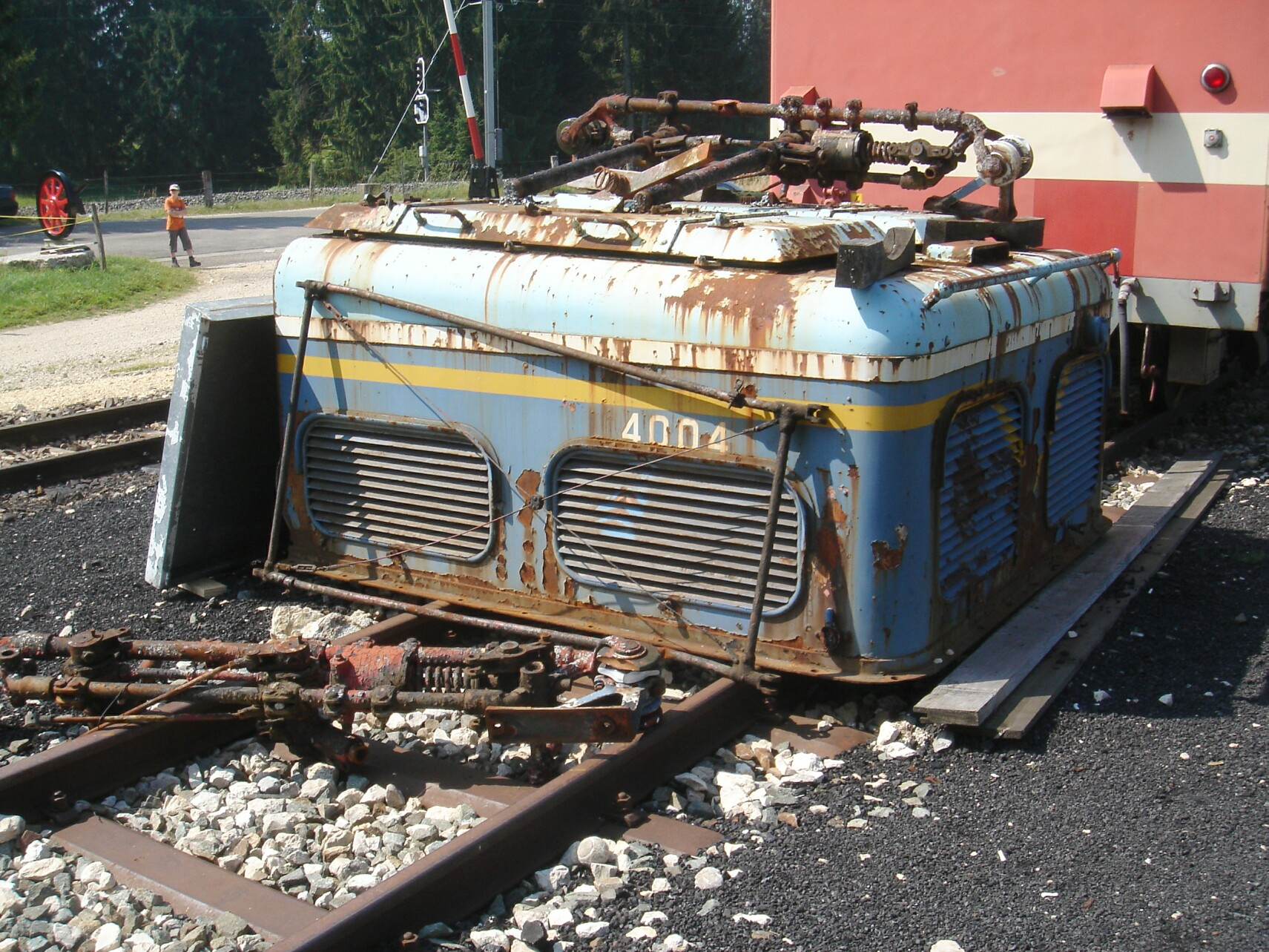 Teile der spanischen Lok 4004 vor dem Schuppen von La Traction in Pré-Petitjean. Inzwischen wurde der Triebwagen abgebrochen.